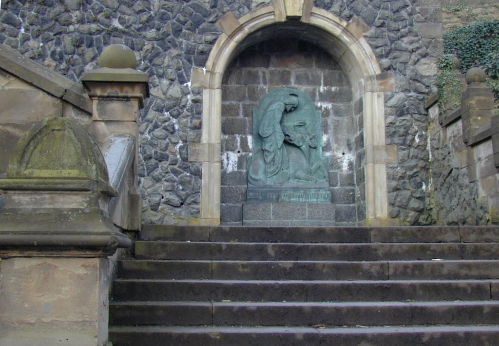 Bronzerelief "Christus heilt ein mißhandeltes Tier" an der Dicke-Ibach Treppe, 2006 gestohlen